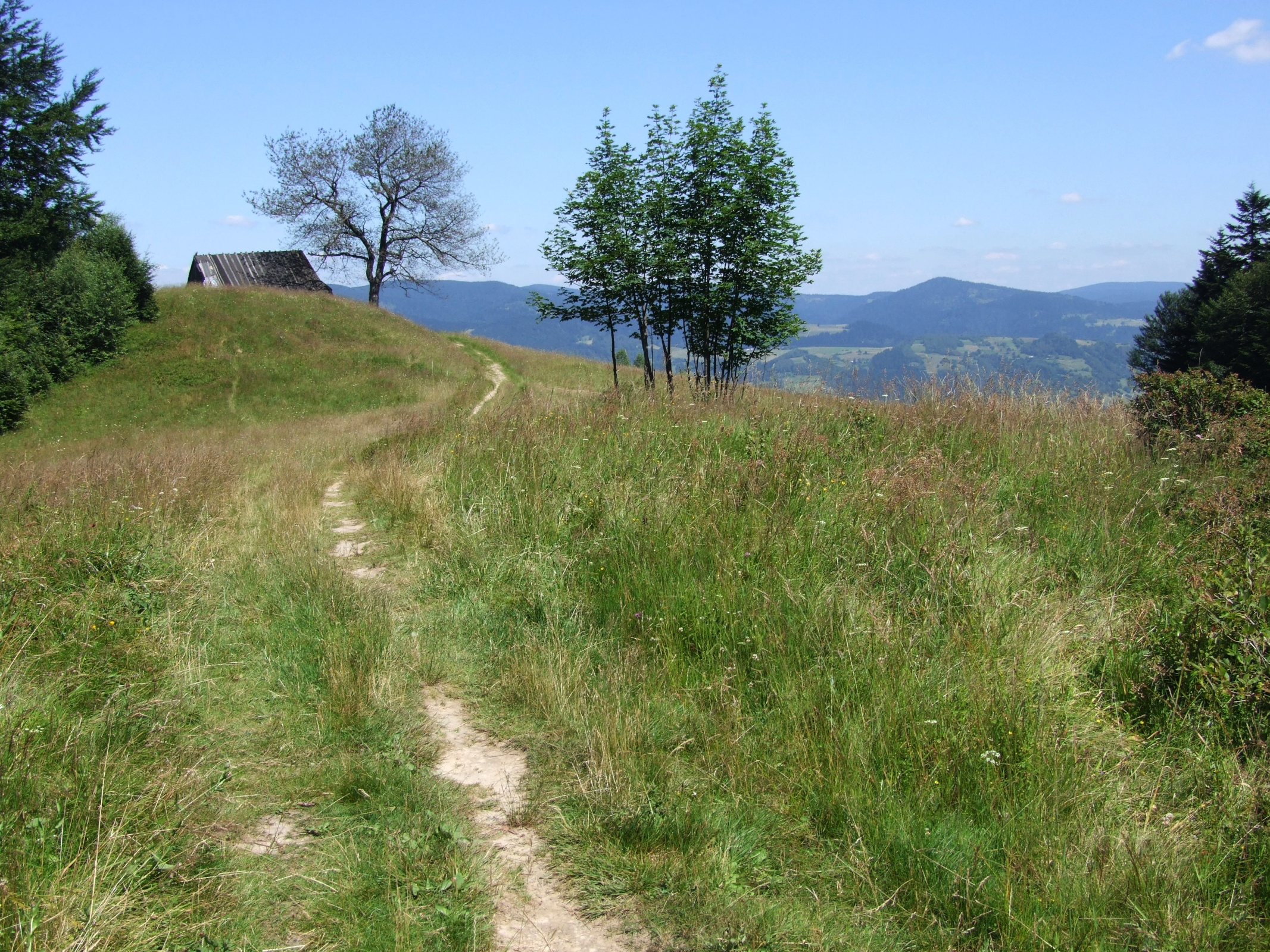 Polana Poczekaj na grzbiecie Kordowiec-Niemcowa w Paśmie Radziejowej. Opuszczony dom